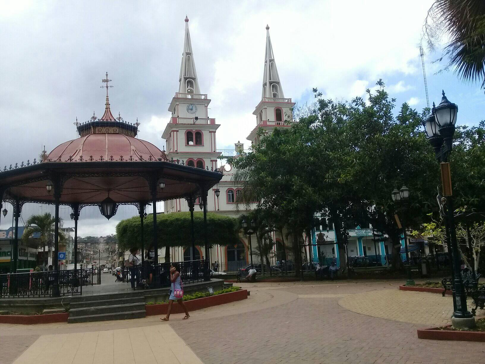 Iglesia de San Lorenzo Mártir, en Jipijapa, Ecuador